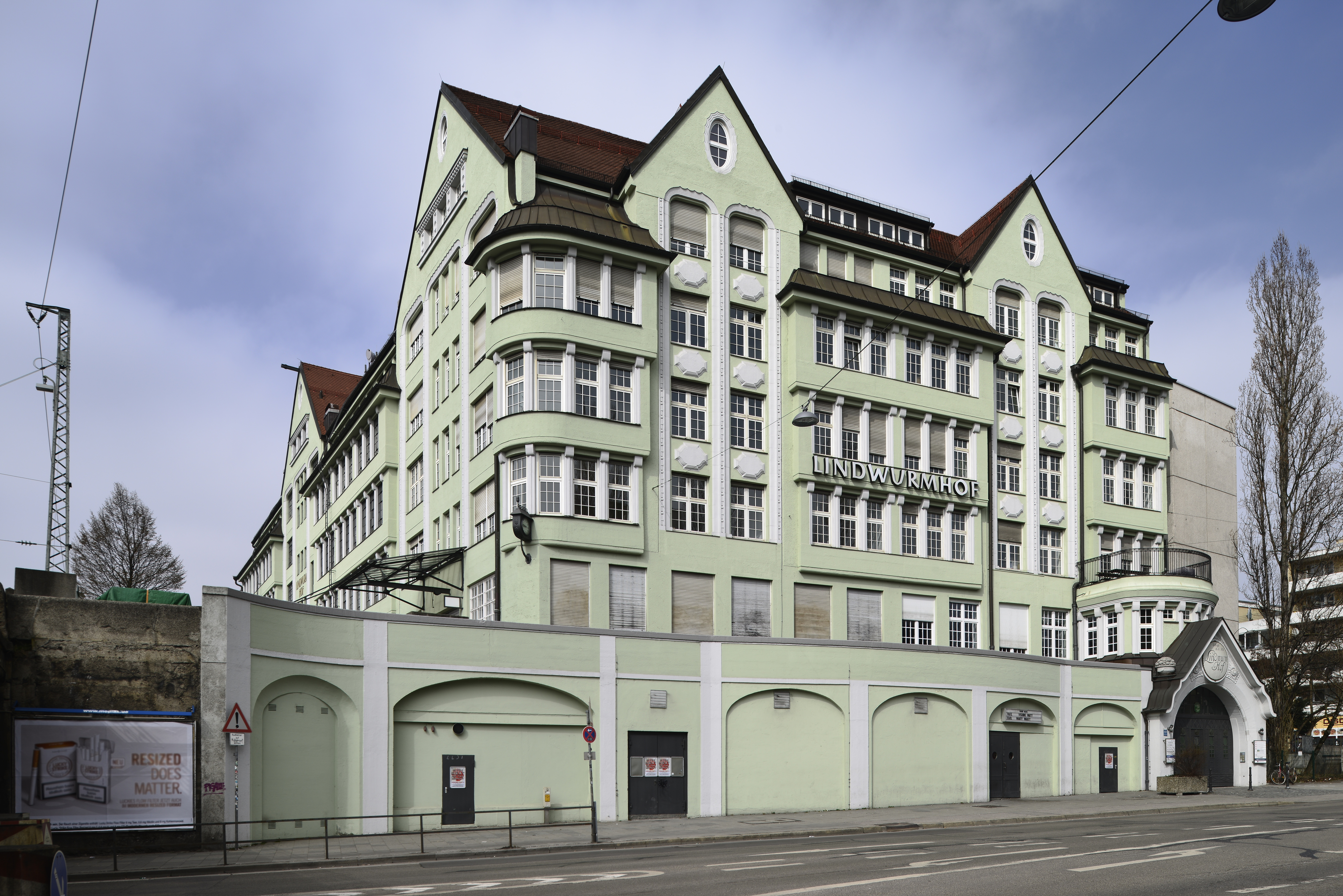 Büro- und Geschäftshaus Lindwurmhof in München, Ludwigsvorstadt, Lindwurmstraße 88; erbaut 1910-1911 von der Bauunternehmung Gebr. Rank; unter Denkmalschutz